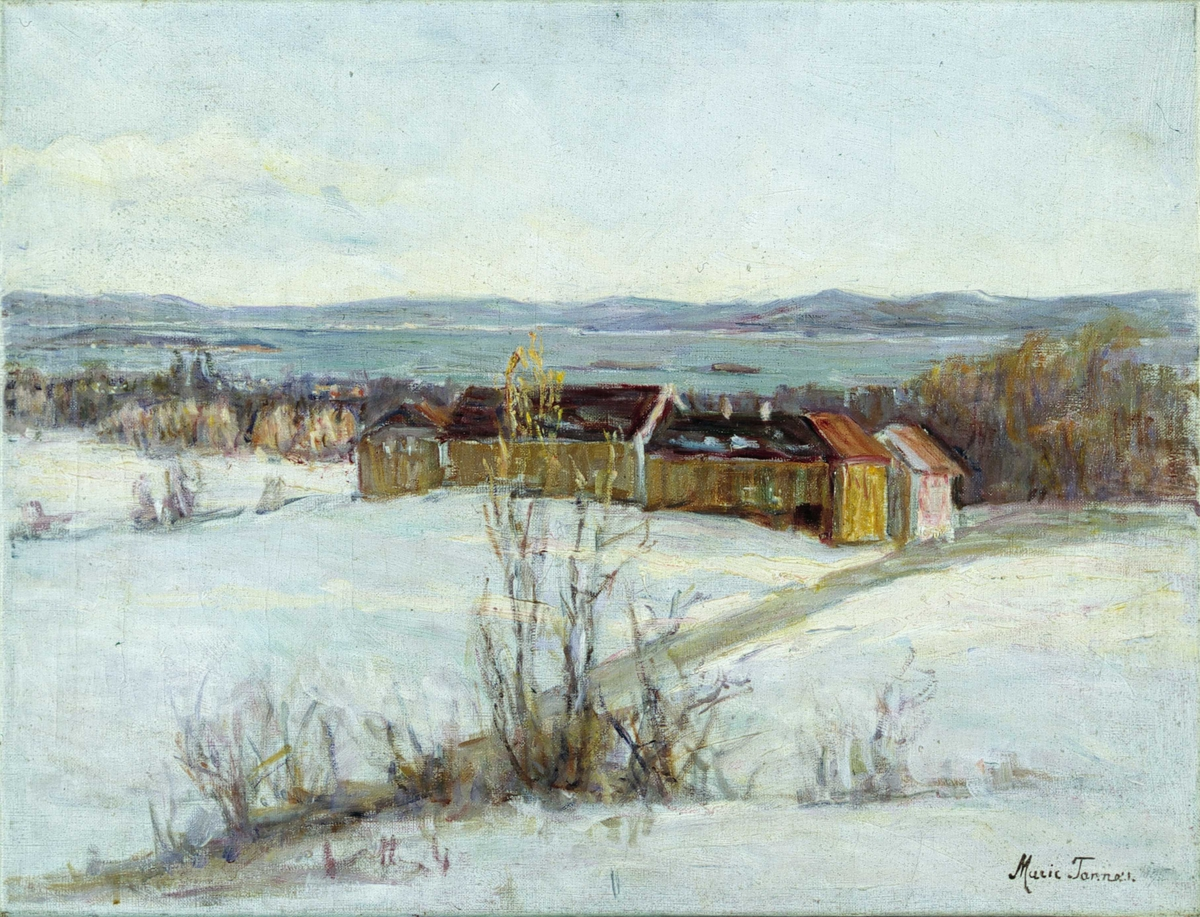 Vinterbilde.